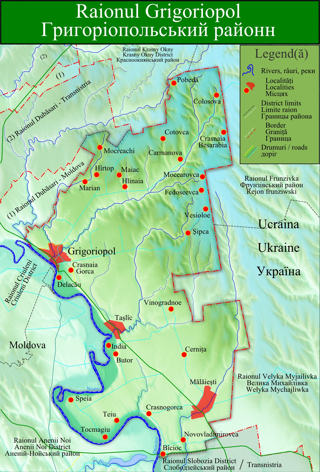 Raionul Grigoriopol, Transnistria.